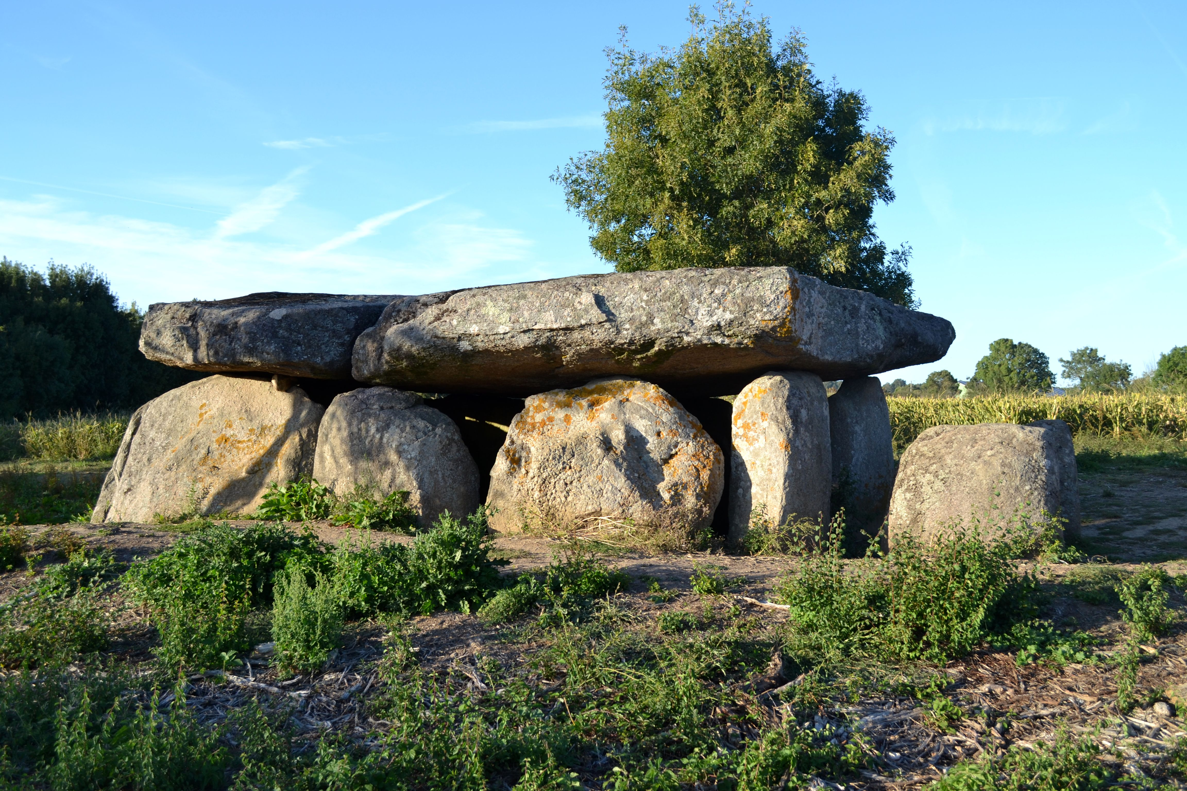 Dolmen de la Frébouchère au Bernard (85).